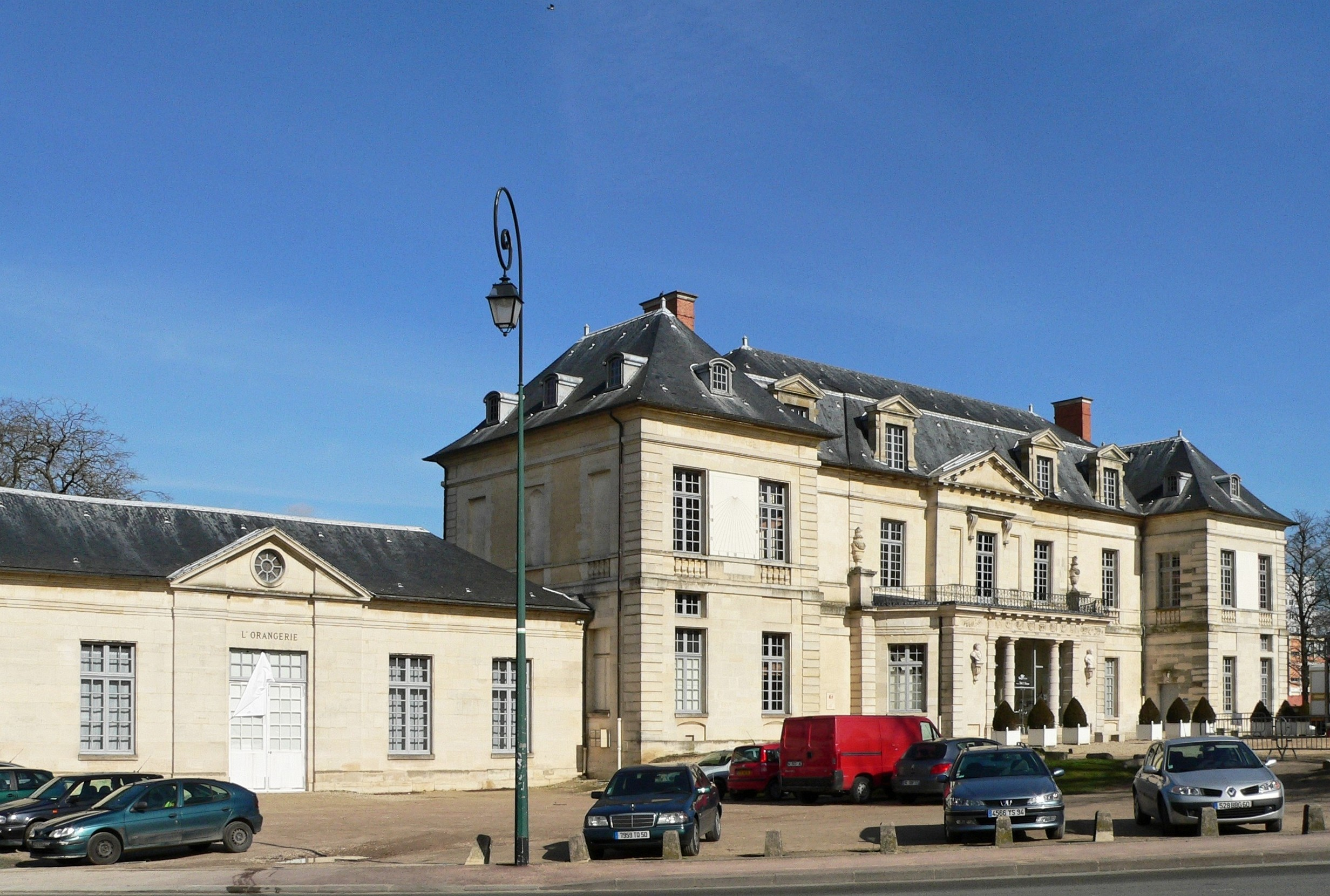 Le Chateau de Sucy en Brie (94)